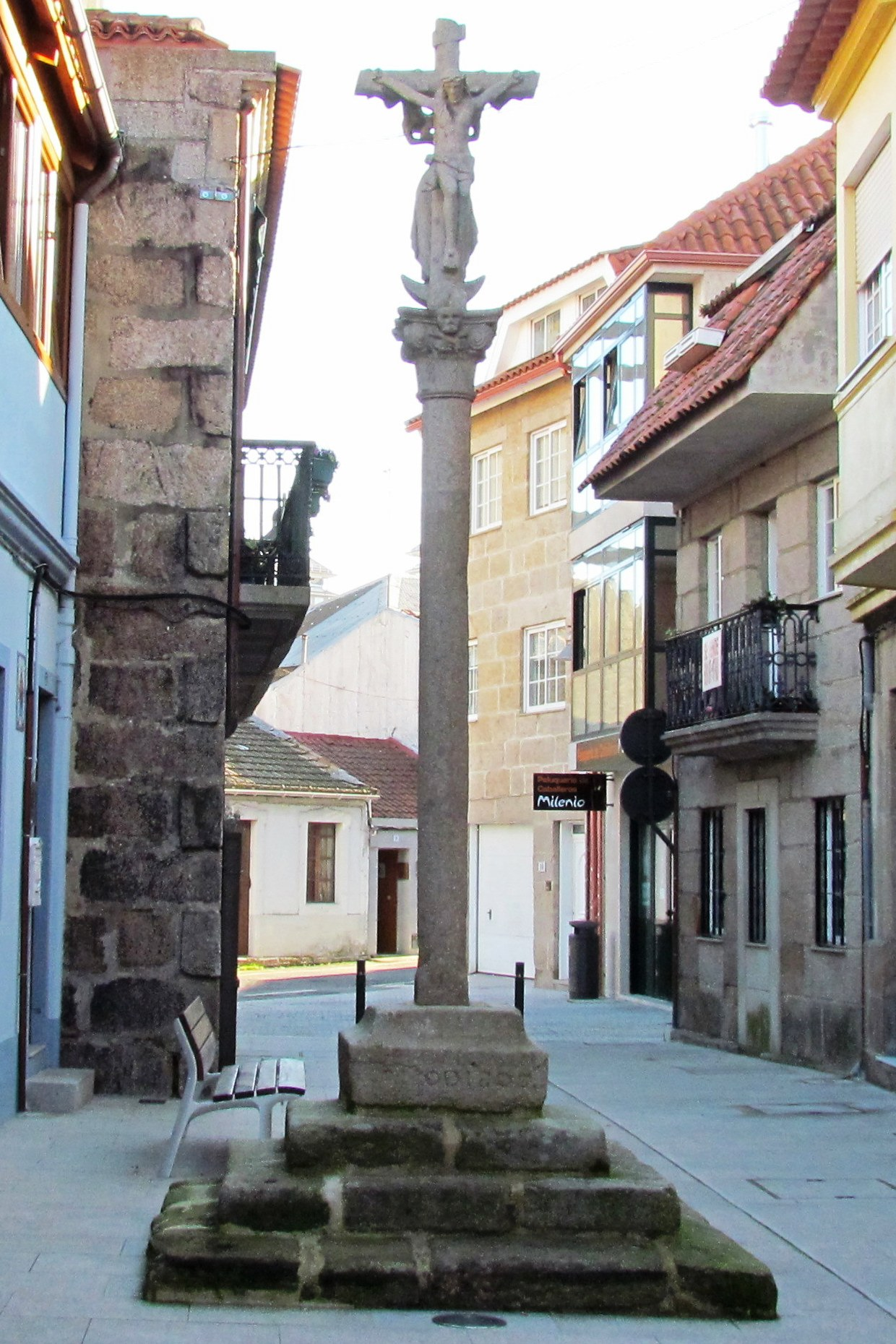 Cruceiro en bouzas